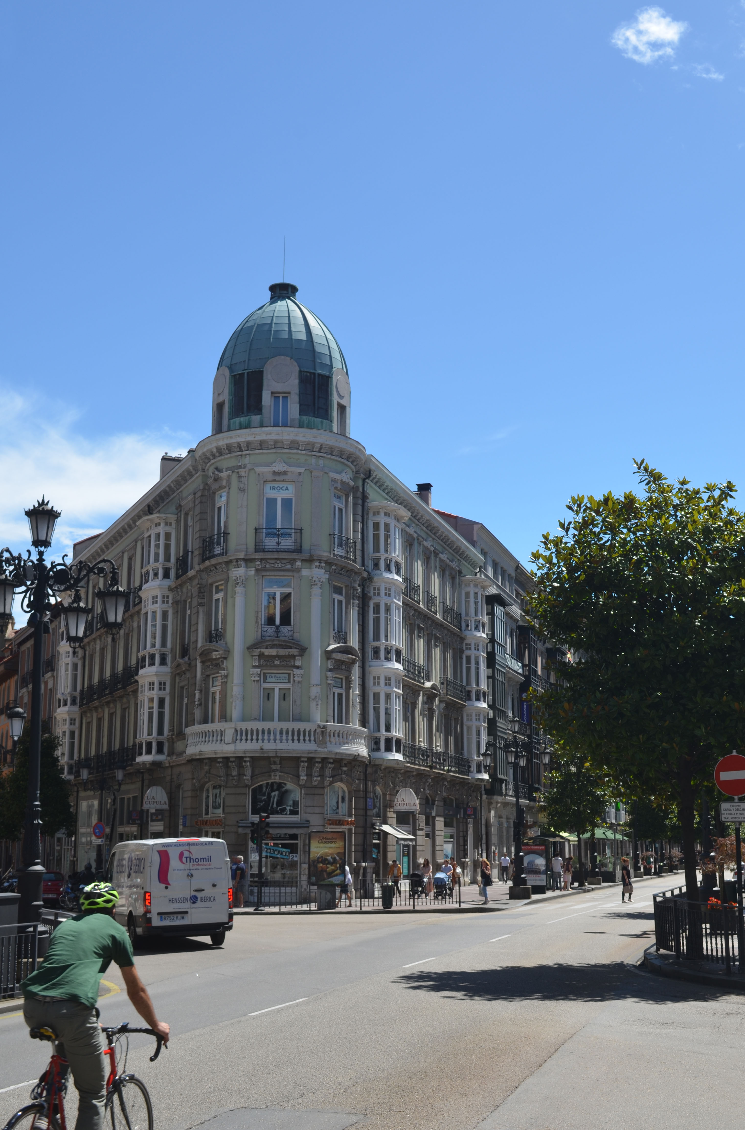 Edificio en la calle Uría de Oviedo (Asturias)